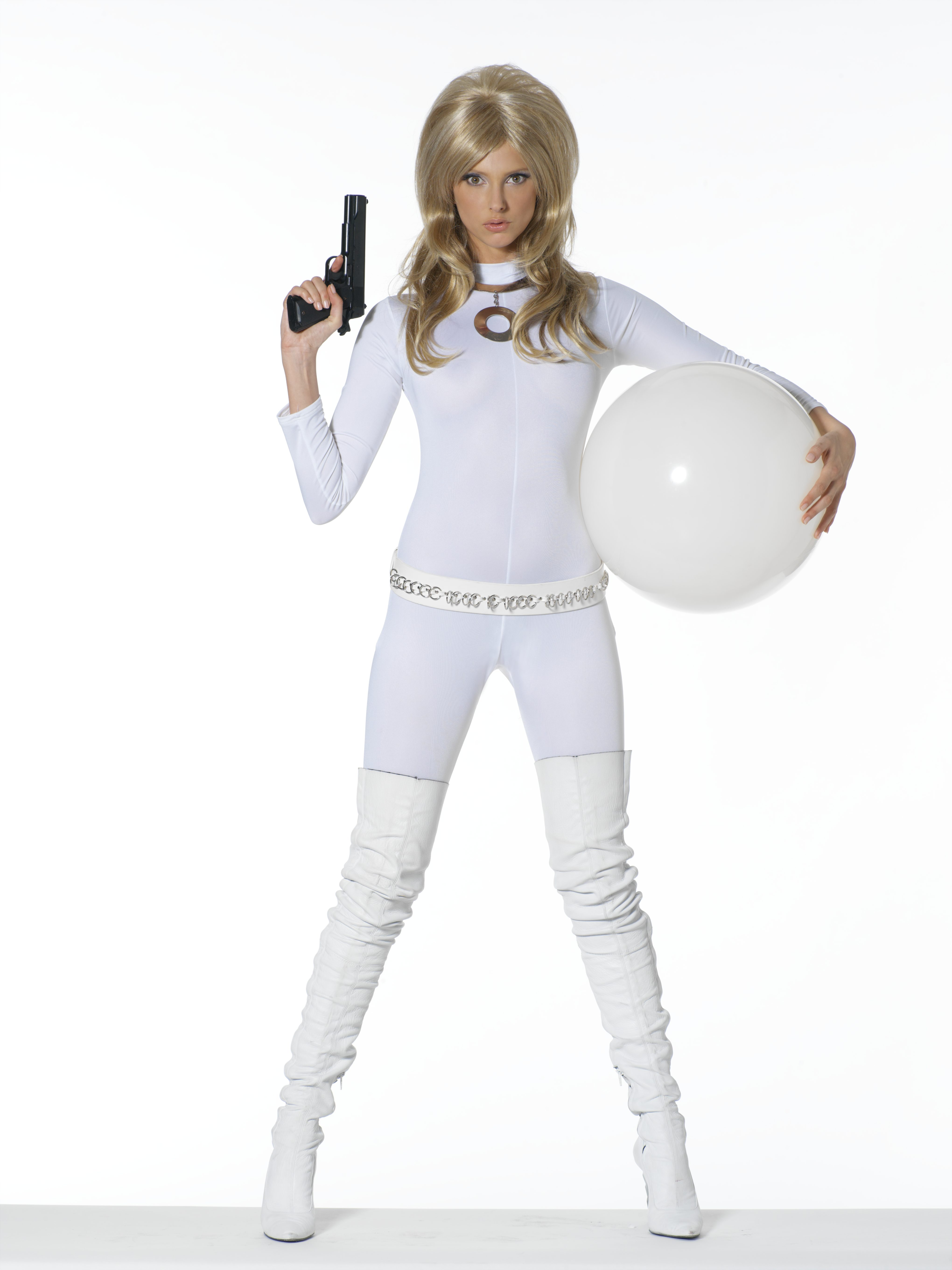 La Minute Blonde